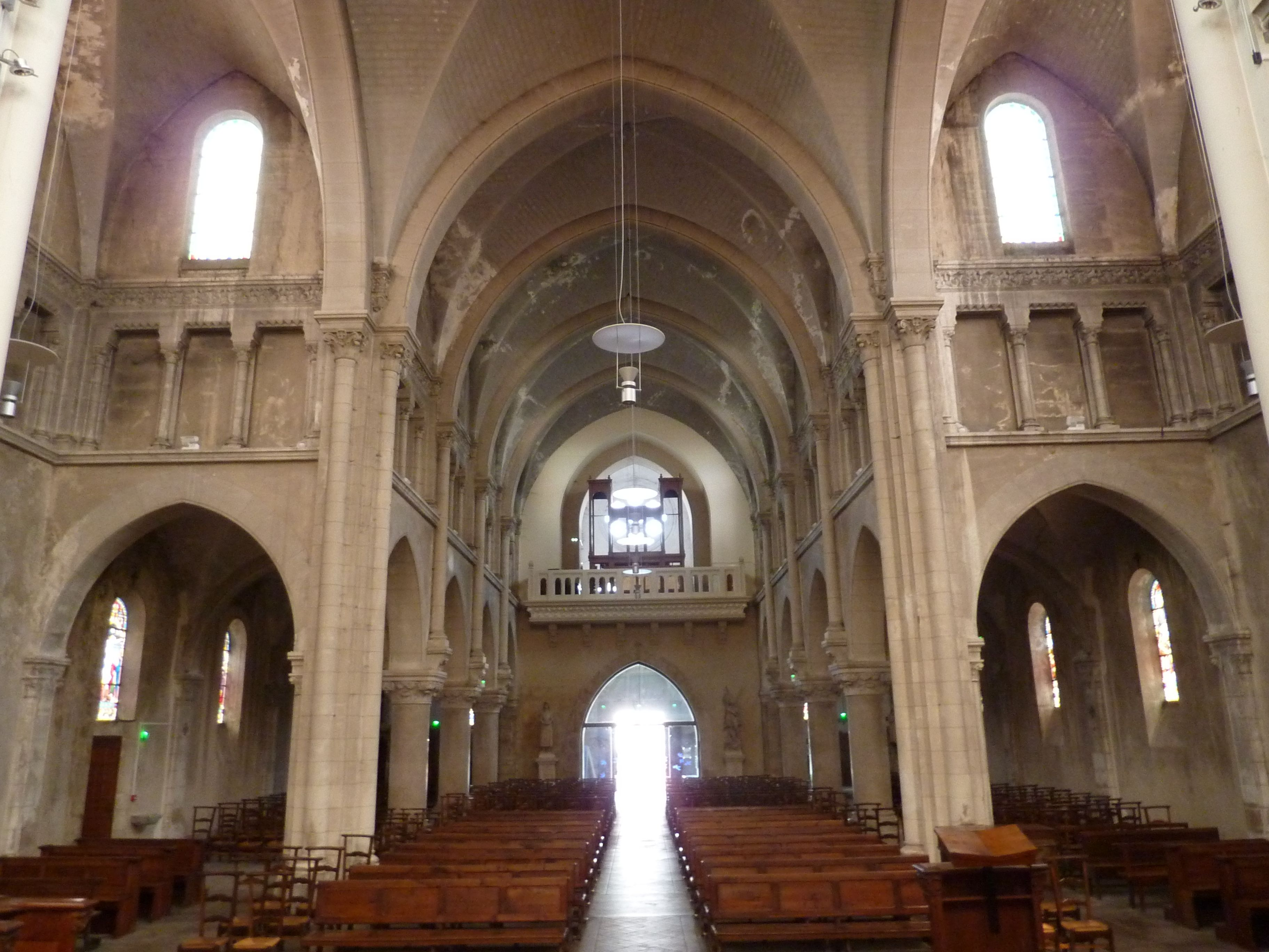 Église Saint-Pierre et Saint-Paul de Moirans, Isère, France. Intérieur.